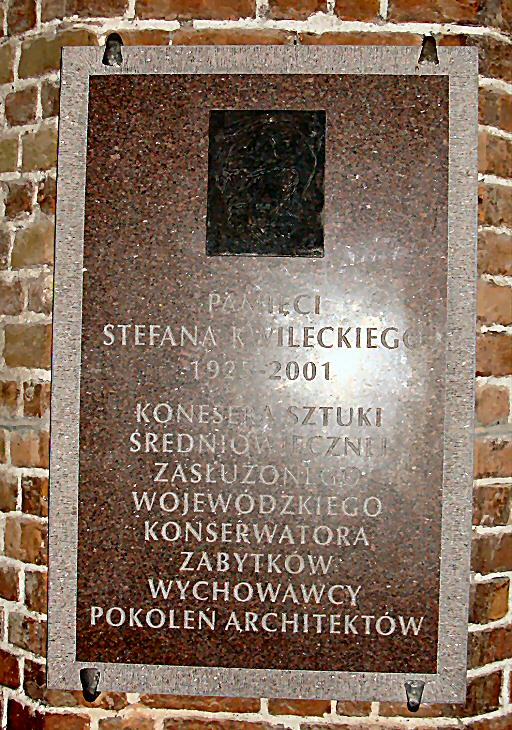 Szczecin Katedra św. Jakuba